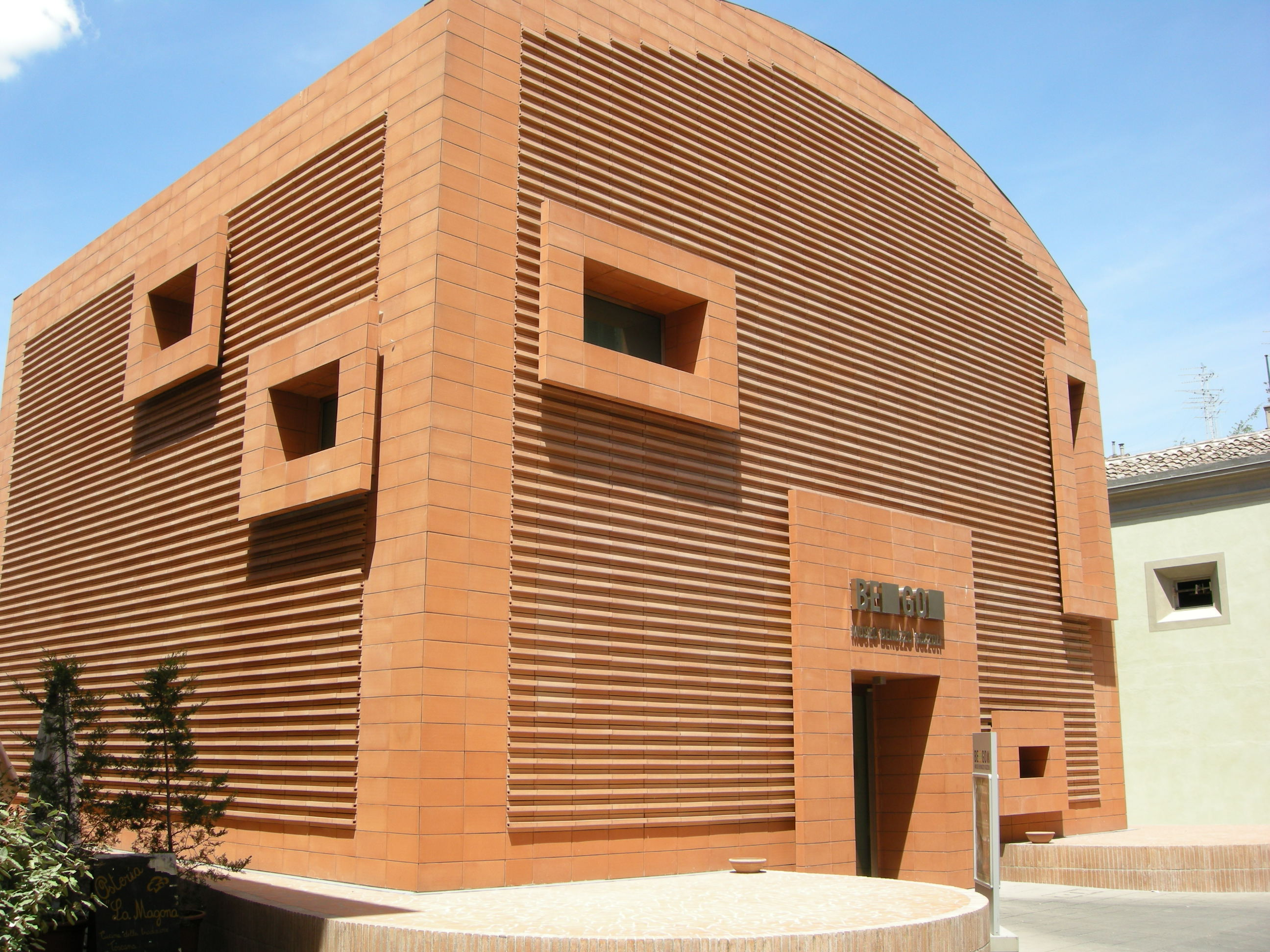 Castelfiorentino, museo benozzo gozzoli (begò)